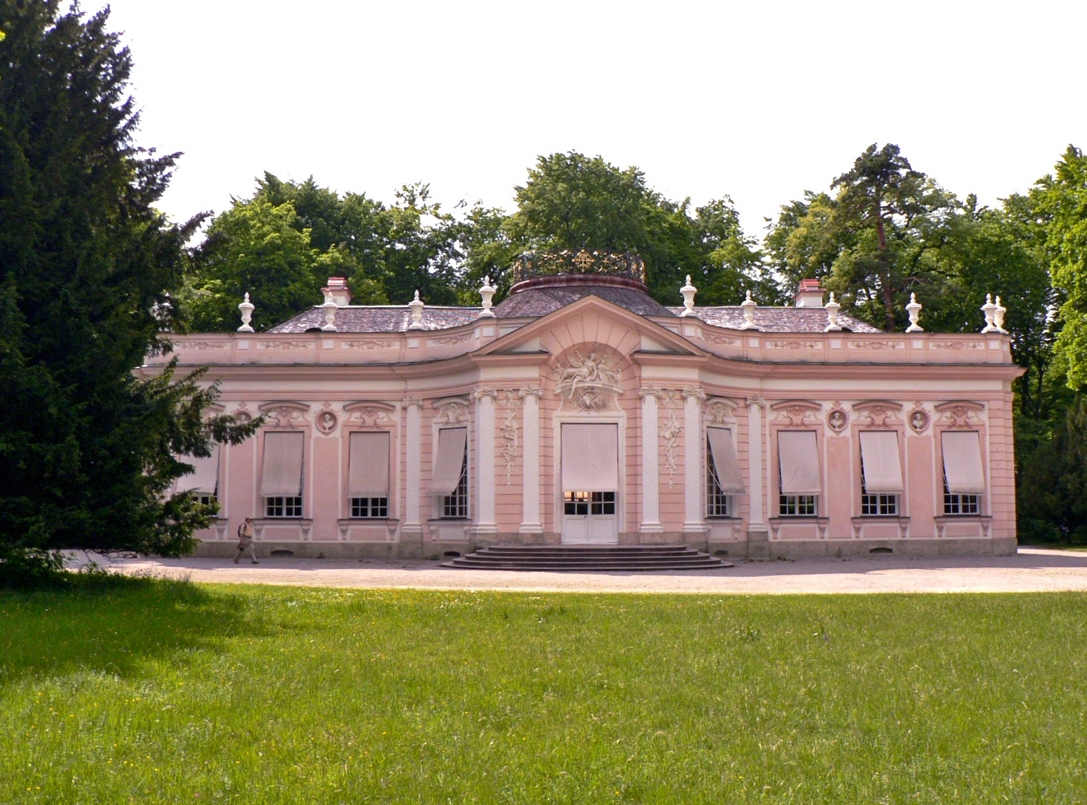 Schloss Amalienburg, (Lustschloss) im Nymphenburger Park München Mai 2007